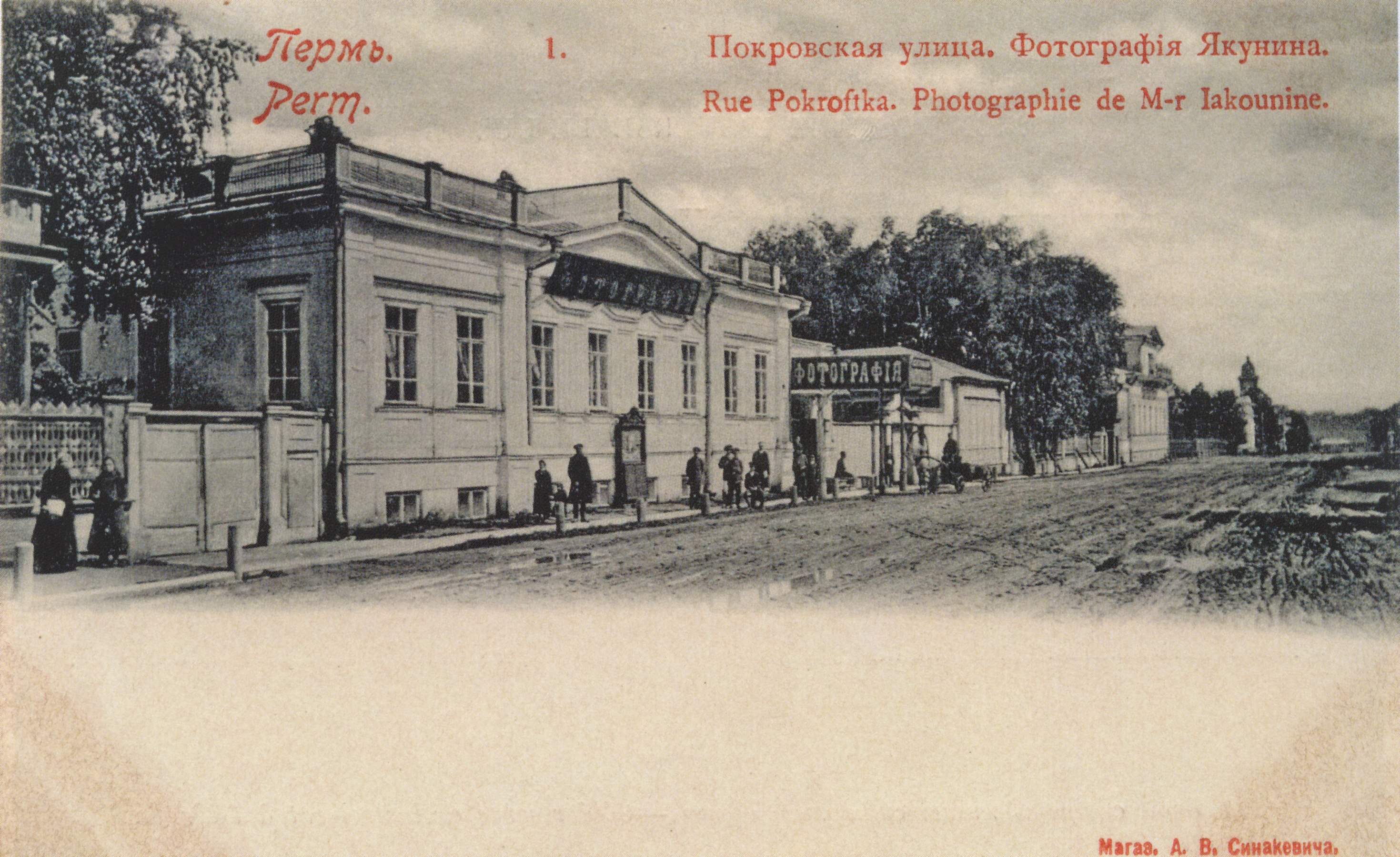 Центральная фотография А. А. Якунина в Перми. Открытка